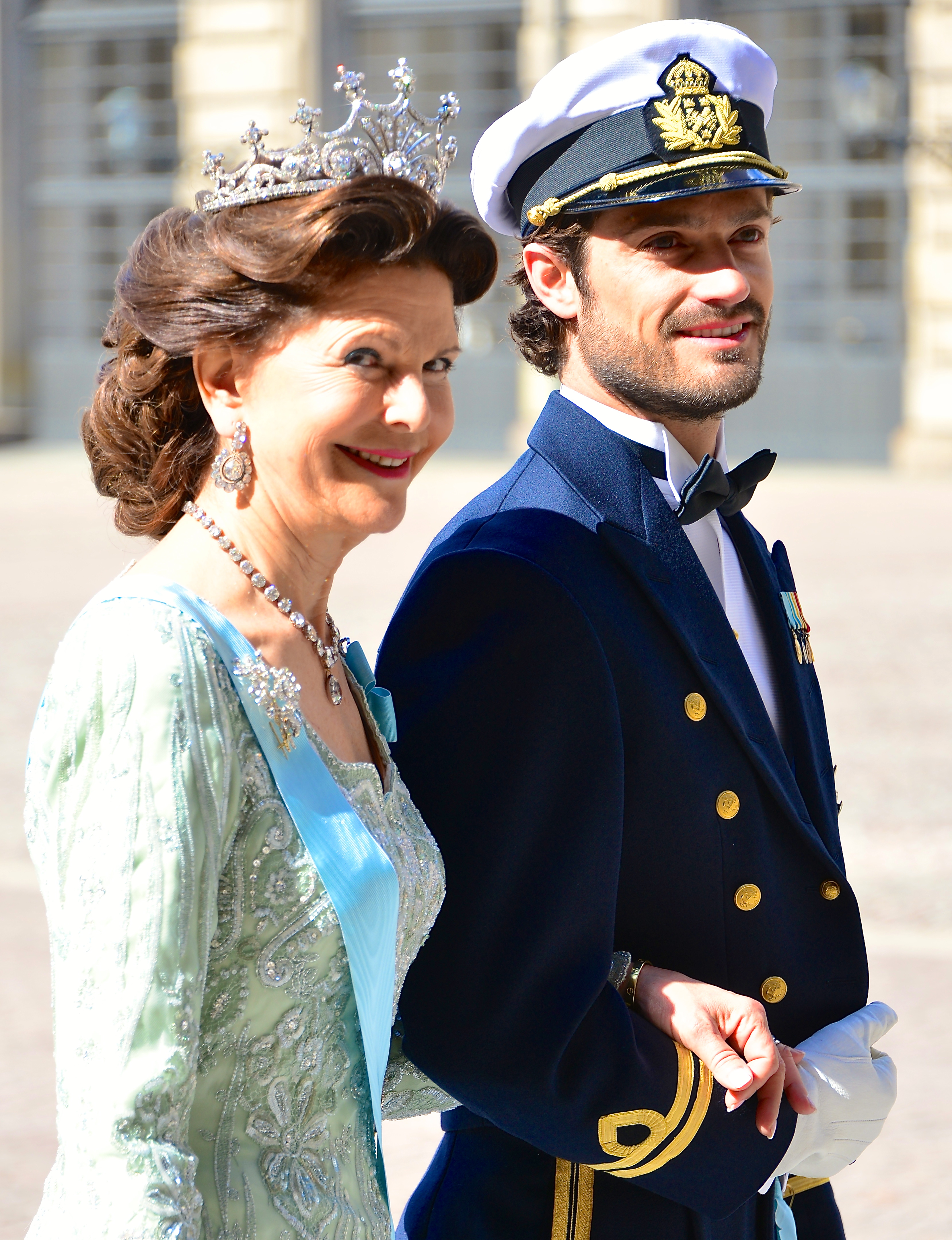 Drottning Silvia & Prins Carl Philip på väg in i slottskyrkan på Kungliga slottet i Stockholm i samband med bröllopet mellan prinsessan Madeleine och Christopher O’Neill, den 8 juni 2013.